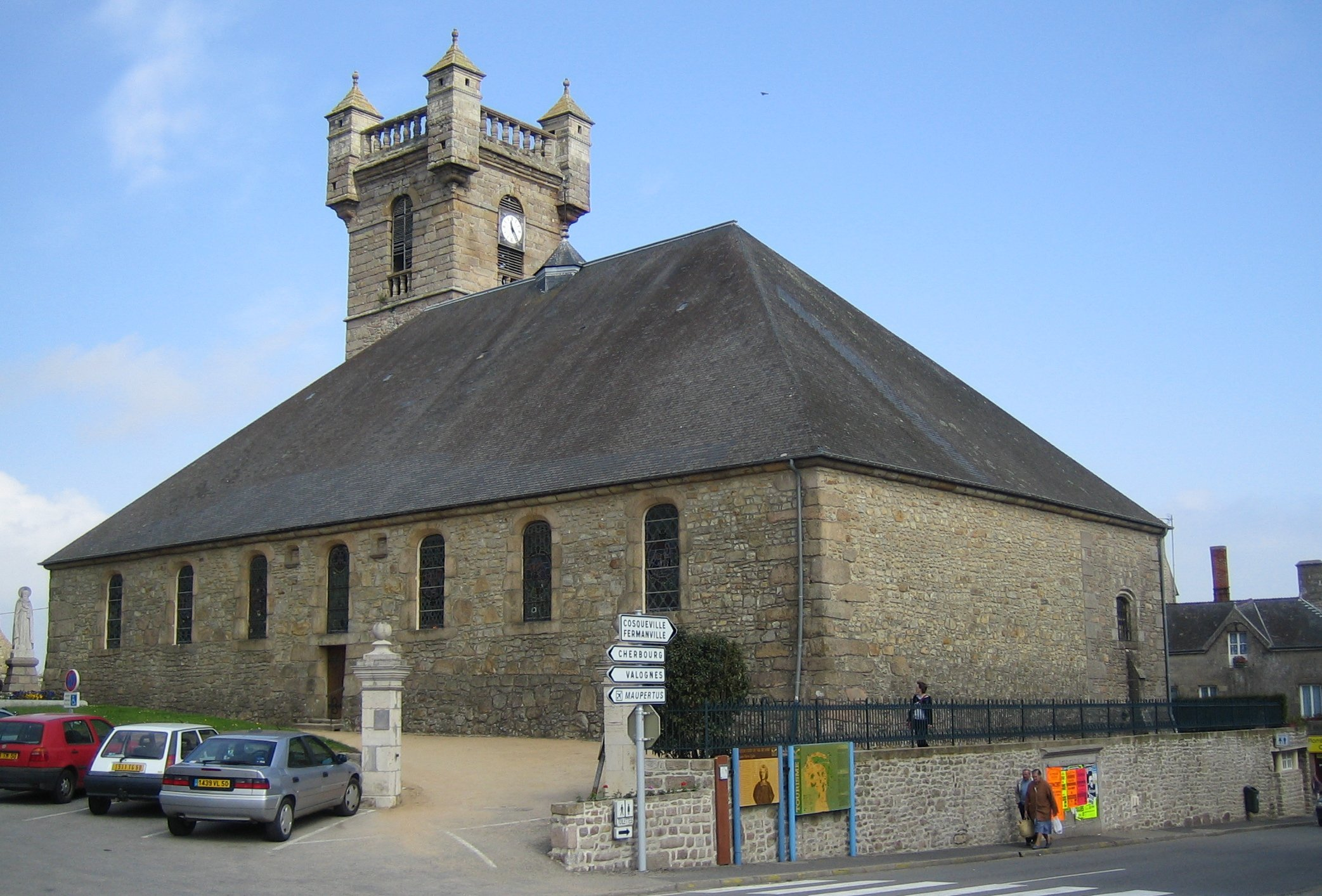 Saint-Pierre-Église (Val de Saire, Cotentin, France, near Cherbourg)